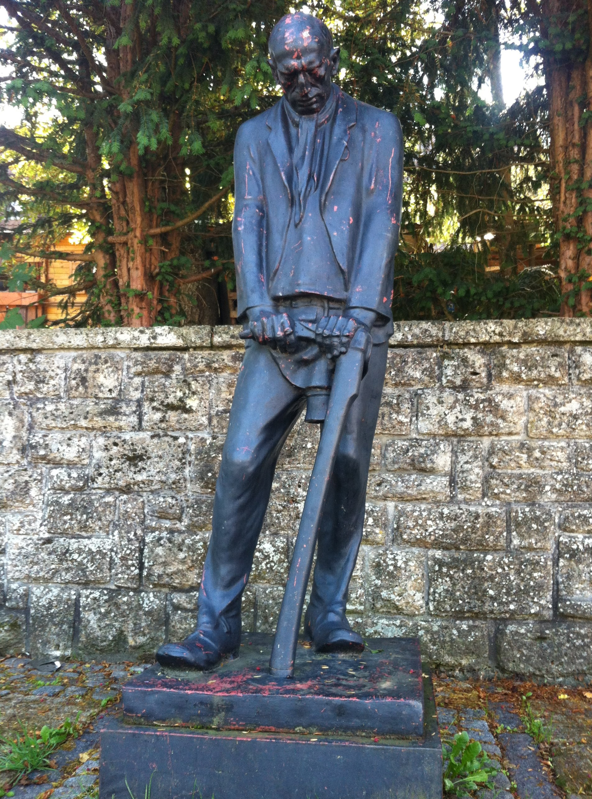 BB Blumberg, Stadt im Schwarzwald-Baar-Kreis in Baden-Württemberg. Von 1934 bis 1942 wurde Blumberg von den Nazis zur „Bergbaustadt“ (Doggererz) getrimmt. Die Skulptur "Schwarzer Mann" erinnert noch an diese Zeit.